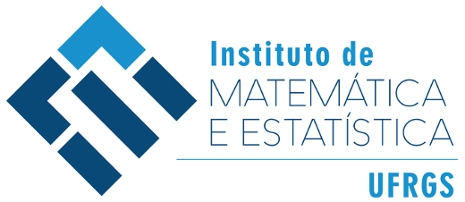 Logo do Institulo de Matemática e Estatística da Universidade Federal do Rio Grande do Sul